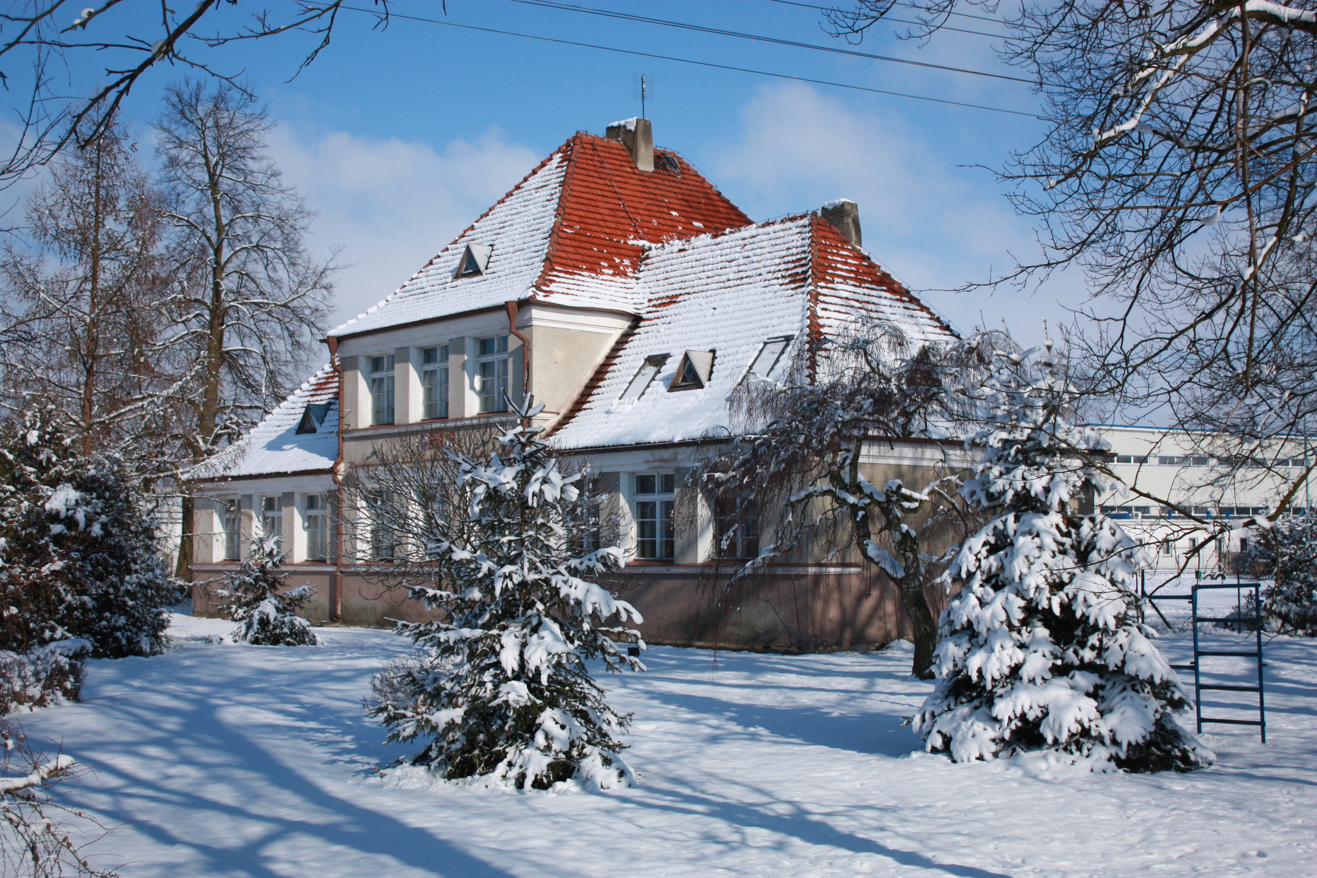 Szkoła MOW Babimost zimą